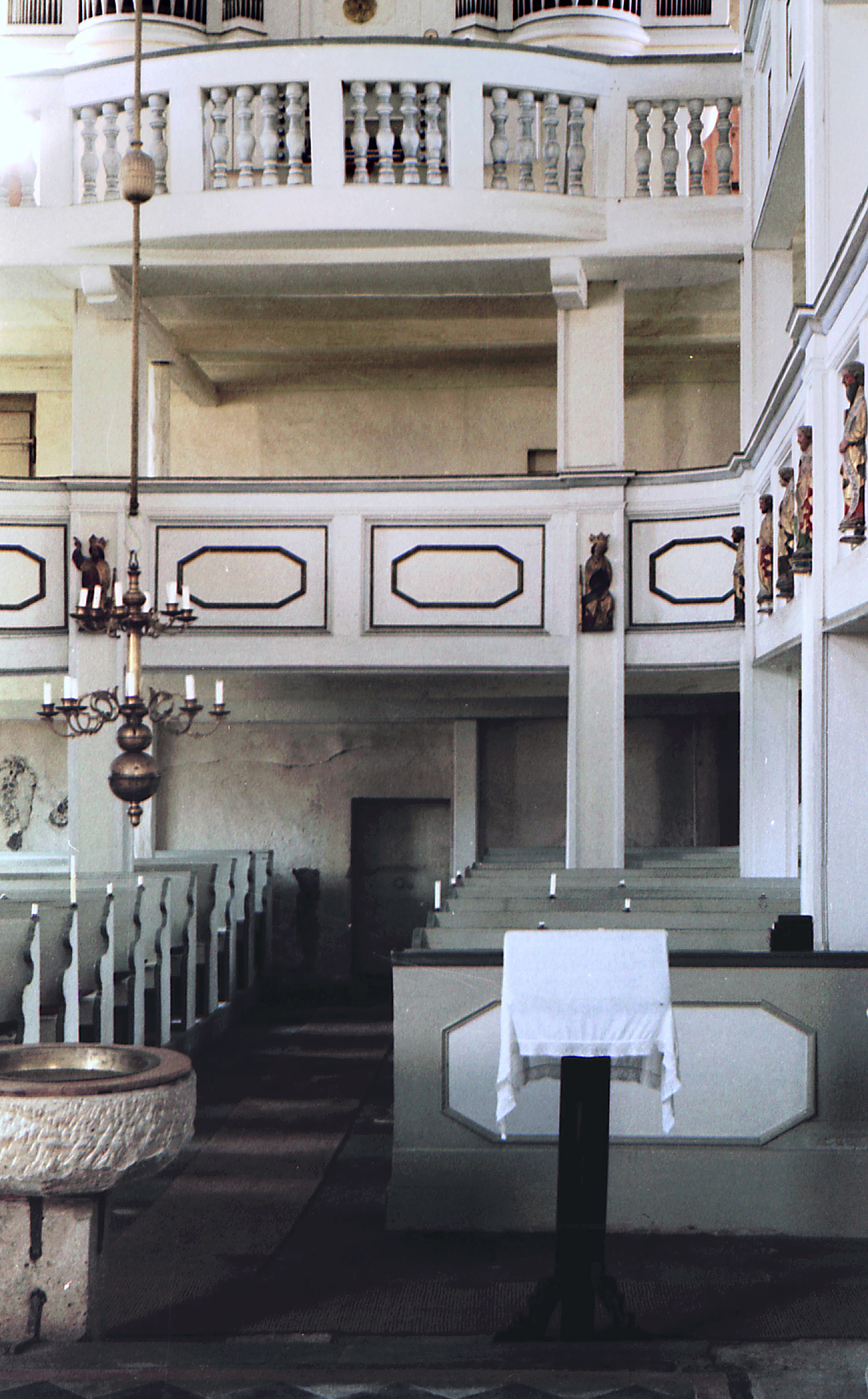 12.07.1985 DDR 5211 [99334] Elleben: Barocke Dorfkirche (GMP: 50.862484,11.092358) von 1729. [F19850712A58.jpg]19850712740AR.JPG(c)Blobelt